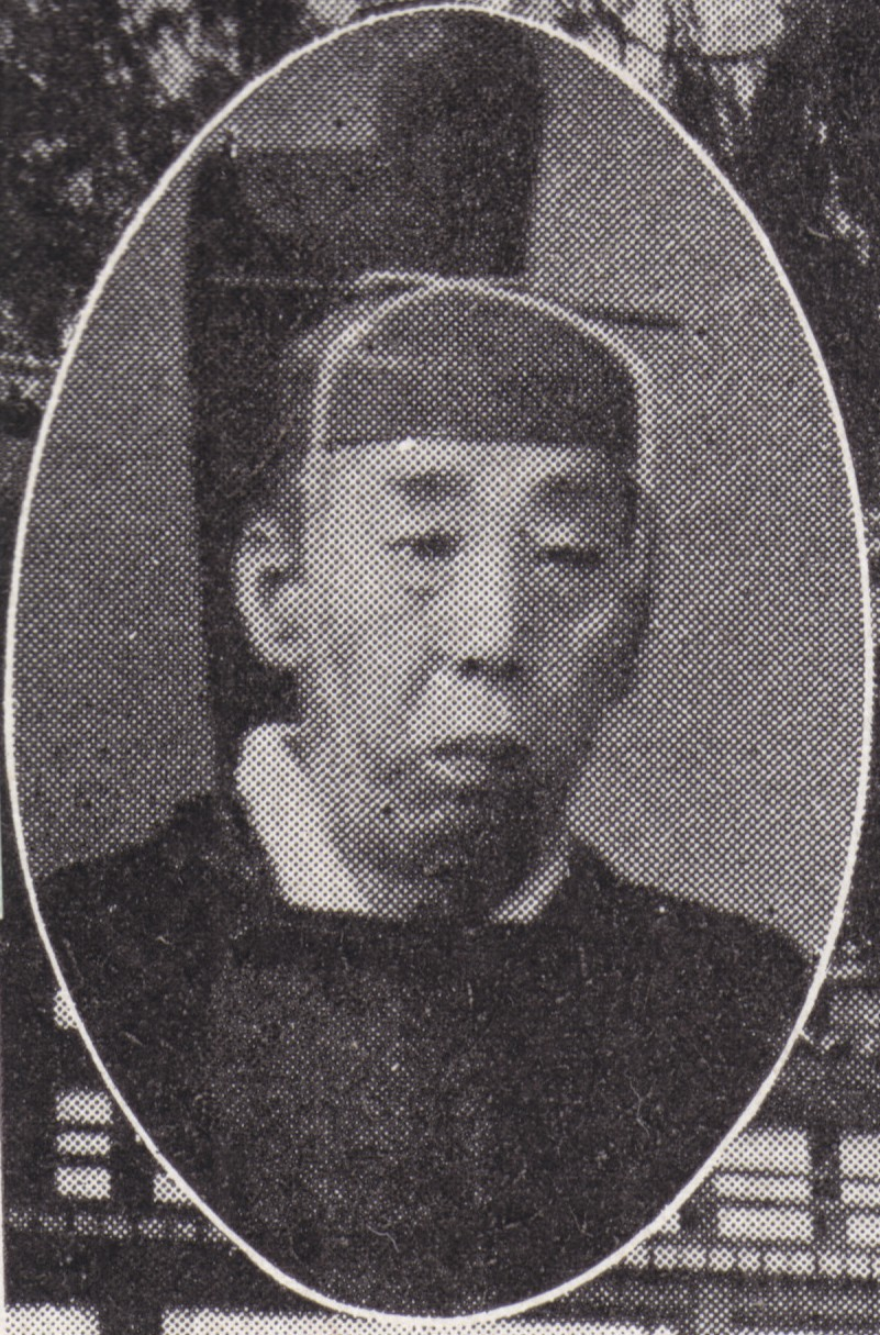 春日神社宮司・男爵水谷川忠起